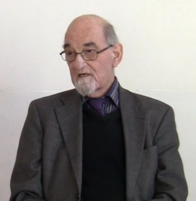 Hans Kristian Neerskov (1932-2017), dansk frikirkepræst og stifter af Dansk Europamission. Foto fra 2013.